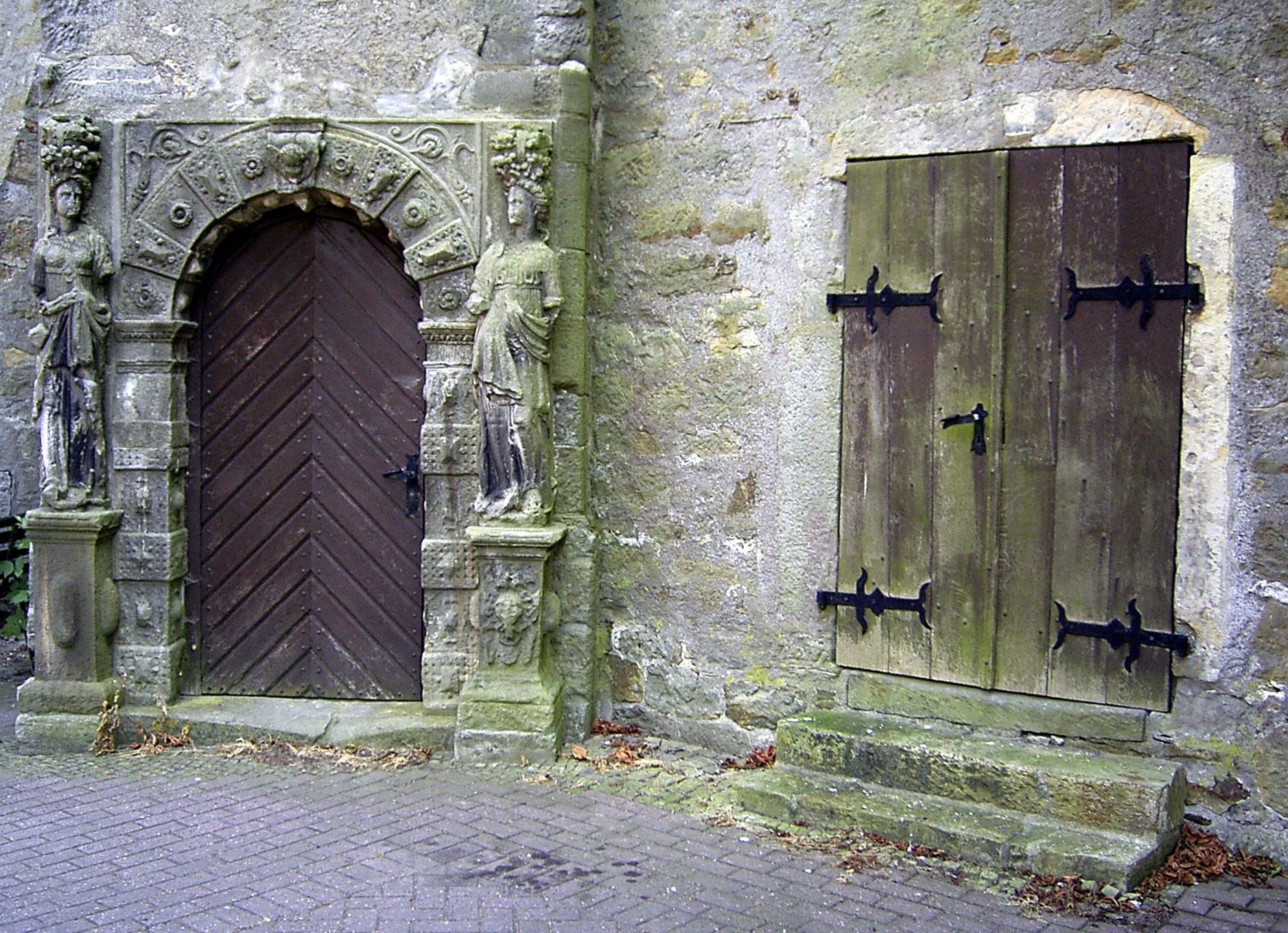 Karyatidenportal am Schlossturm in Sachsenhagen. Copyright: GNU FDL (für die GNU FDL)